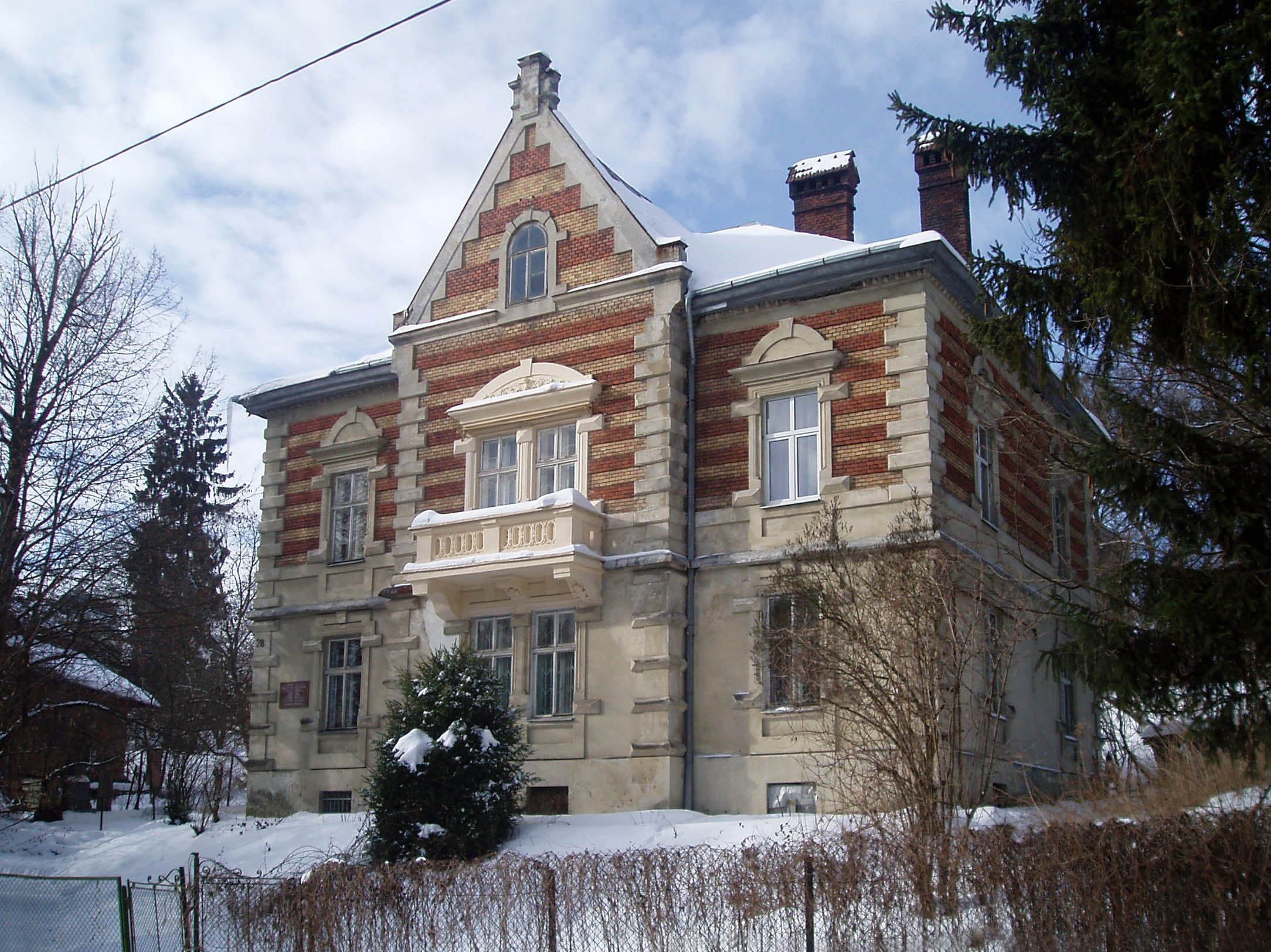 Будинок № 28 на вулиці Самчука у Львові. Збудований 1897 року за проектом Наполеона Лущкевича (1859—1908). Тут проживали Адам та Мечислав Солтиси.